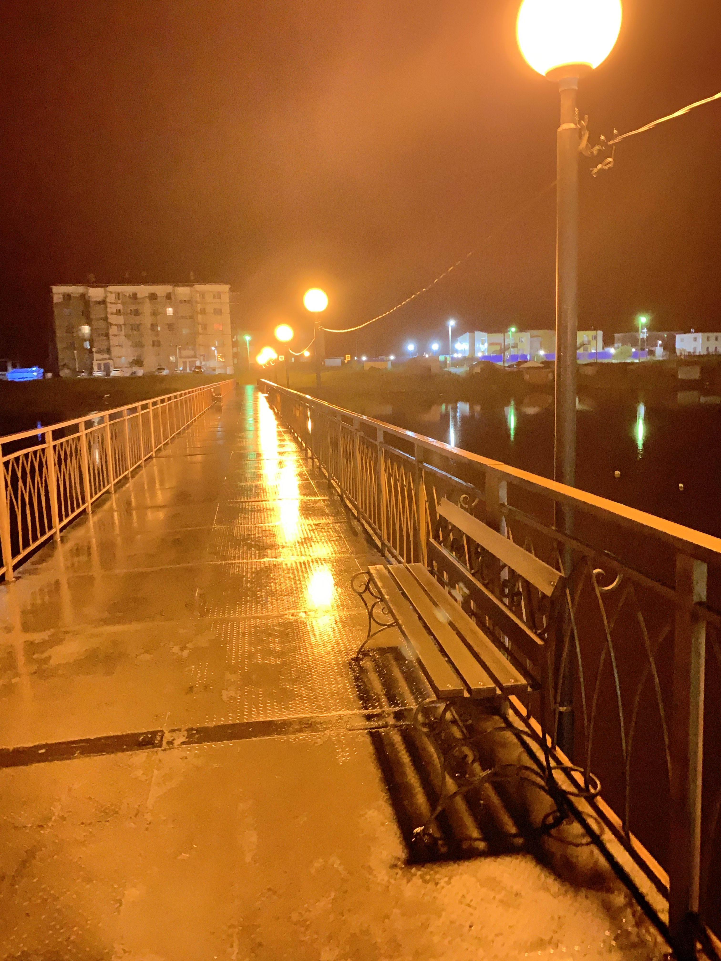 Новый пешеходный мост (БОН)